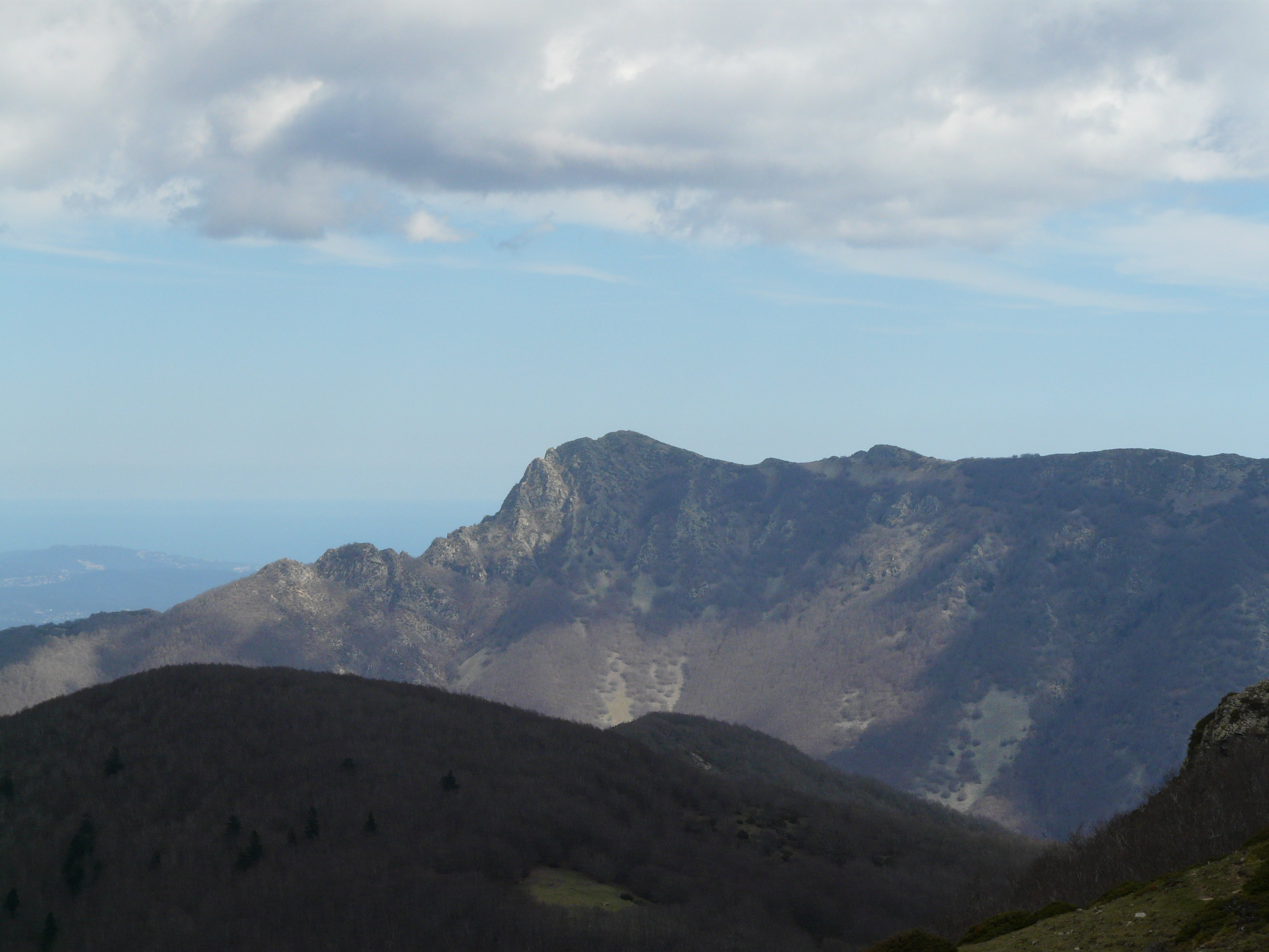 les Agudes (Vallès Oriental) (Fogars de Montclús). Montseny. This is a a photo of an emblematic summit in Catalonia, Spain, with id: CE-296107006 Object location41° 47′ 22.03″ N, 2° 26′ 38.09″ E